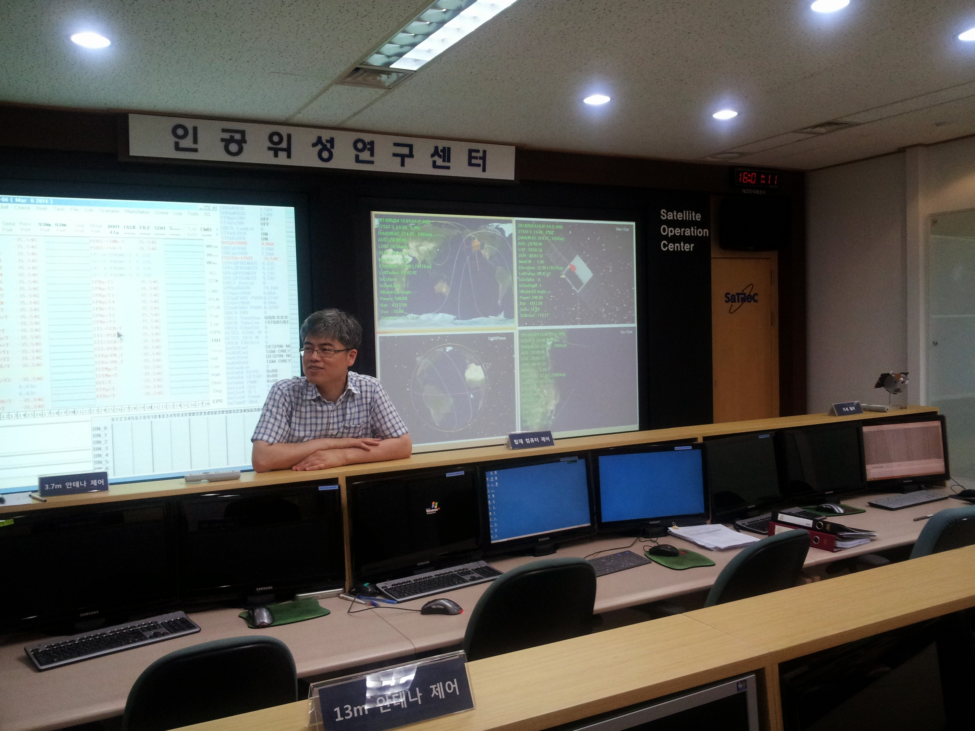 KAIST 인공위성관제센터 내부 모습